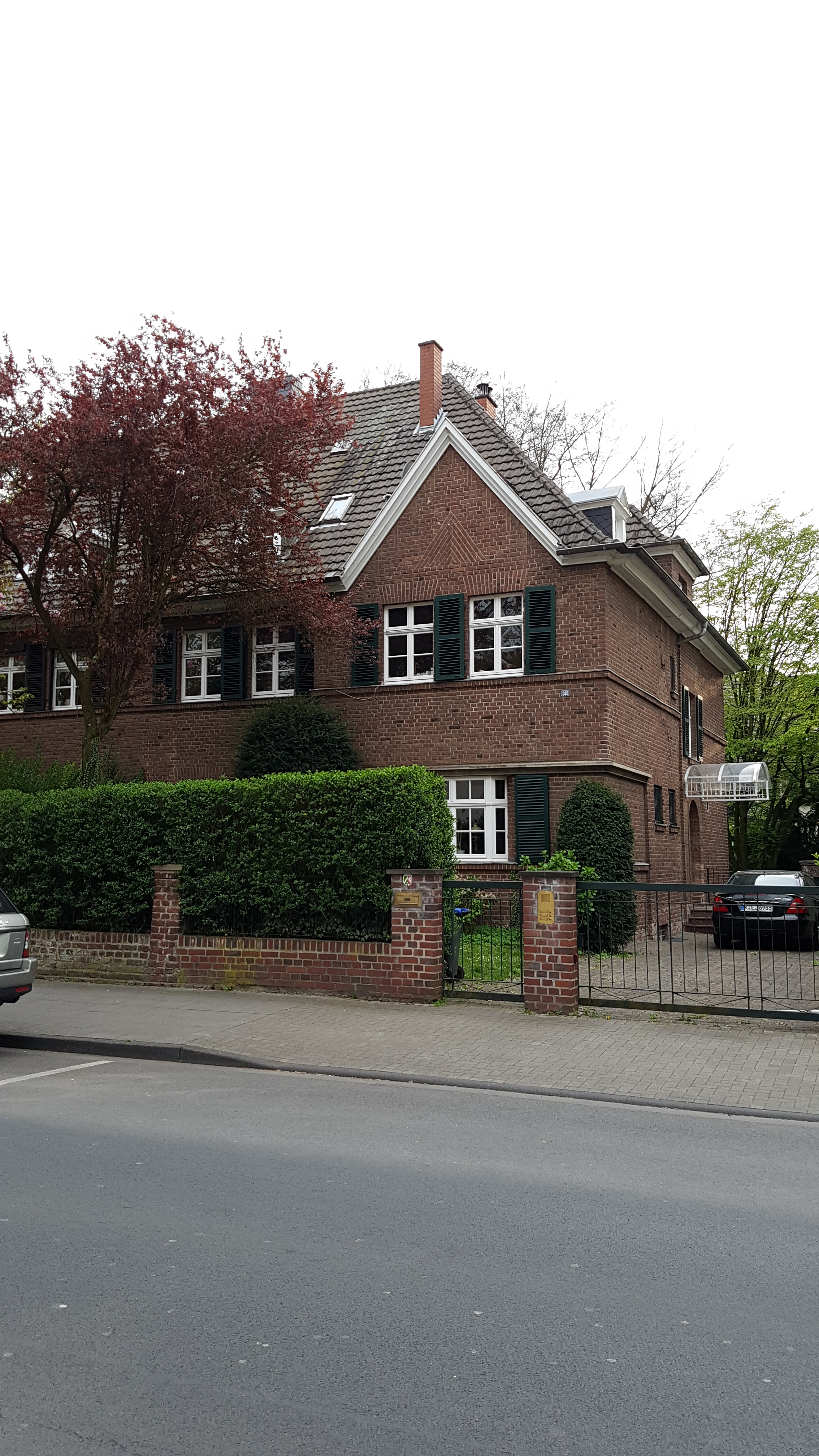 Wohnhaus, Goltsteinstr. 148This is a photograph of an architectural monument.